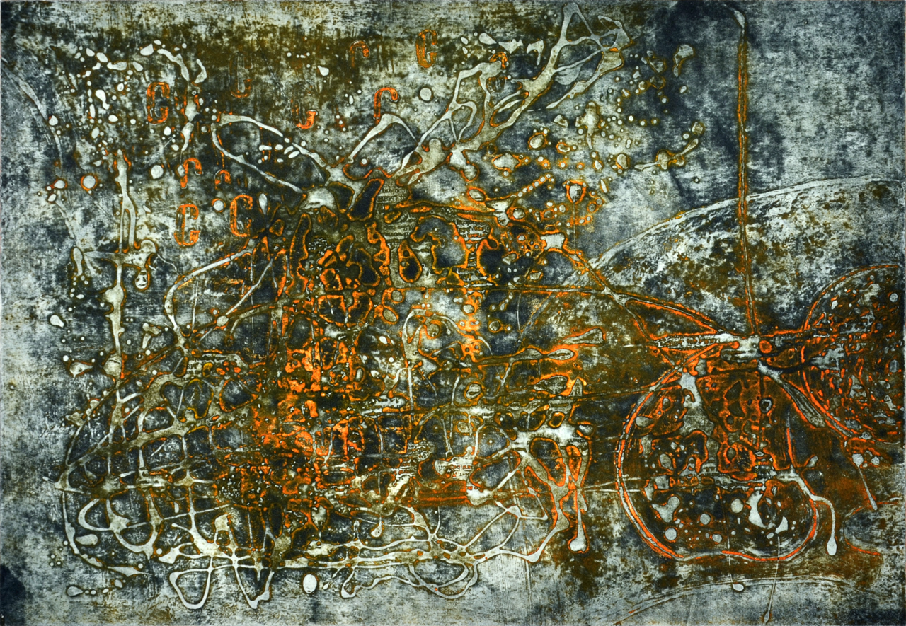 Oldřich Hamera, Bergamia praecedens, strukturální monotyp, 28x40 cm, 1966